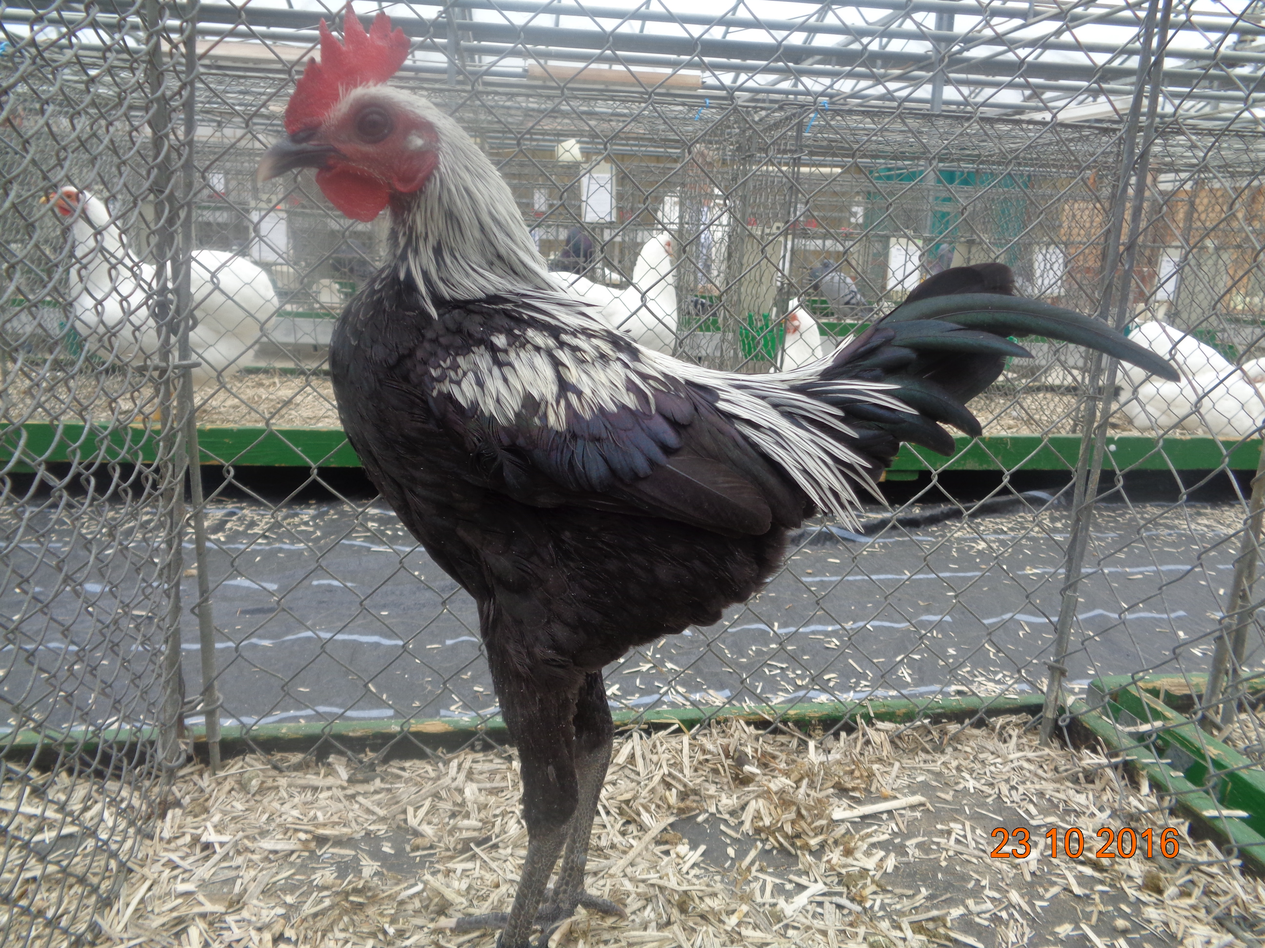 Coq combattant